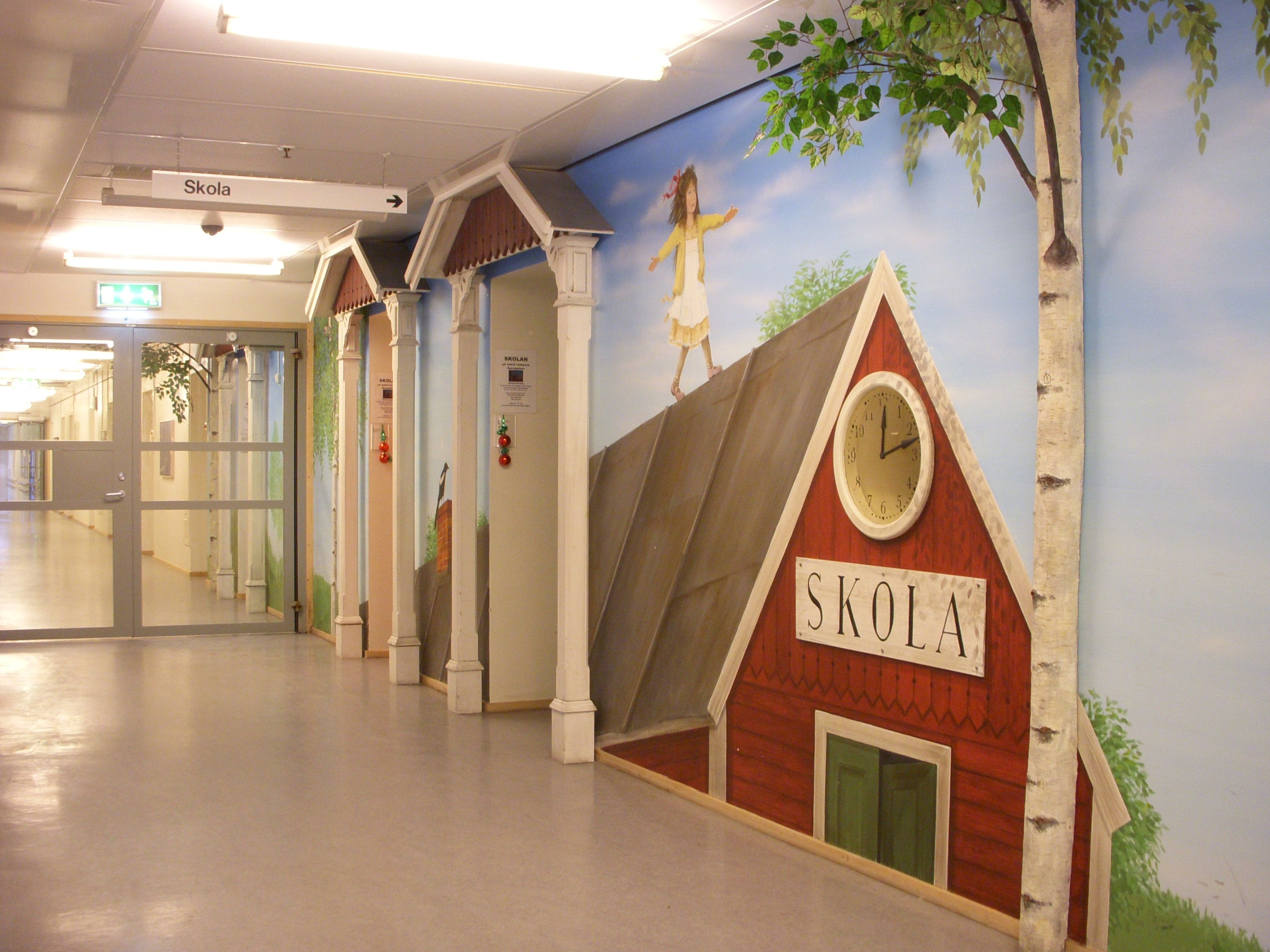 Astrid Lindgrens Barnsjukhus i Solna